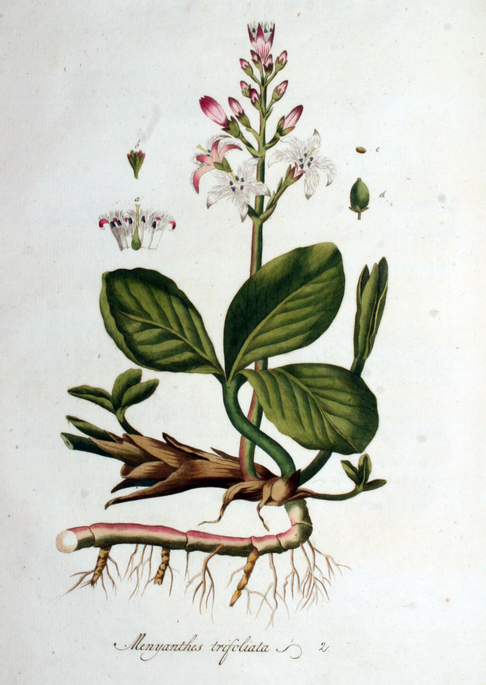 Menyanthes trifoliata L.